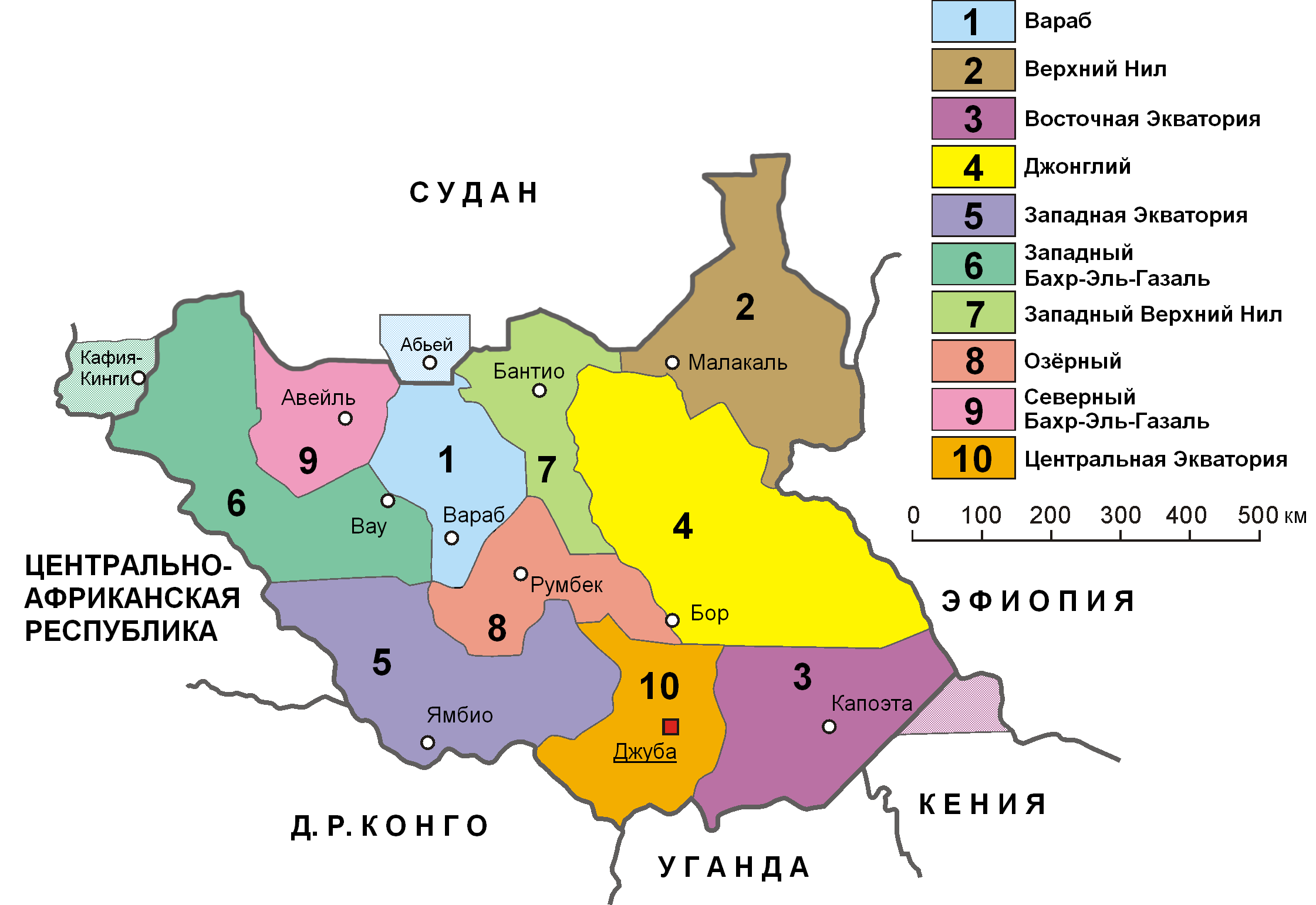 Административная карта Южного Судана